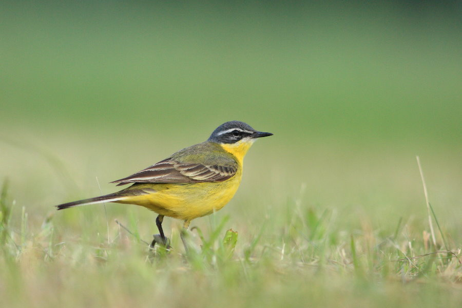 Pliszka żółta Motacilla flava